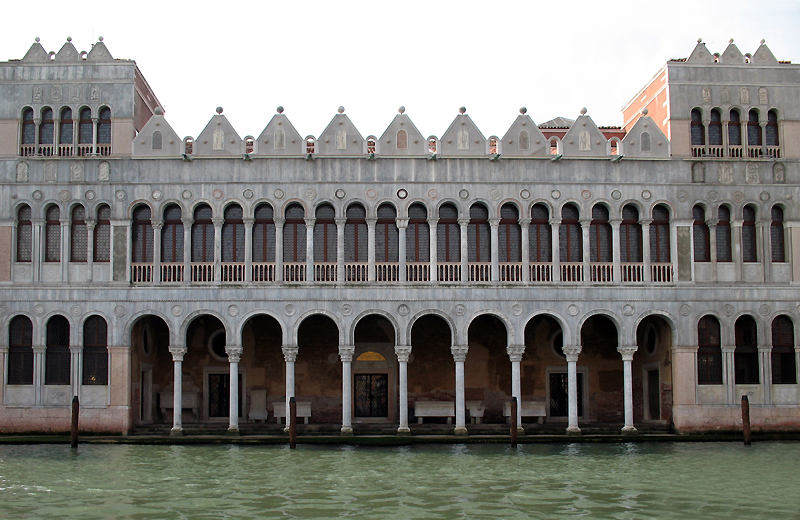 Handelshaus der Türken am Canal Grande, venedig.